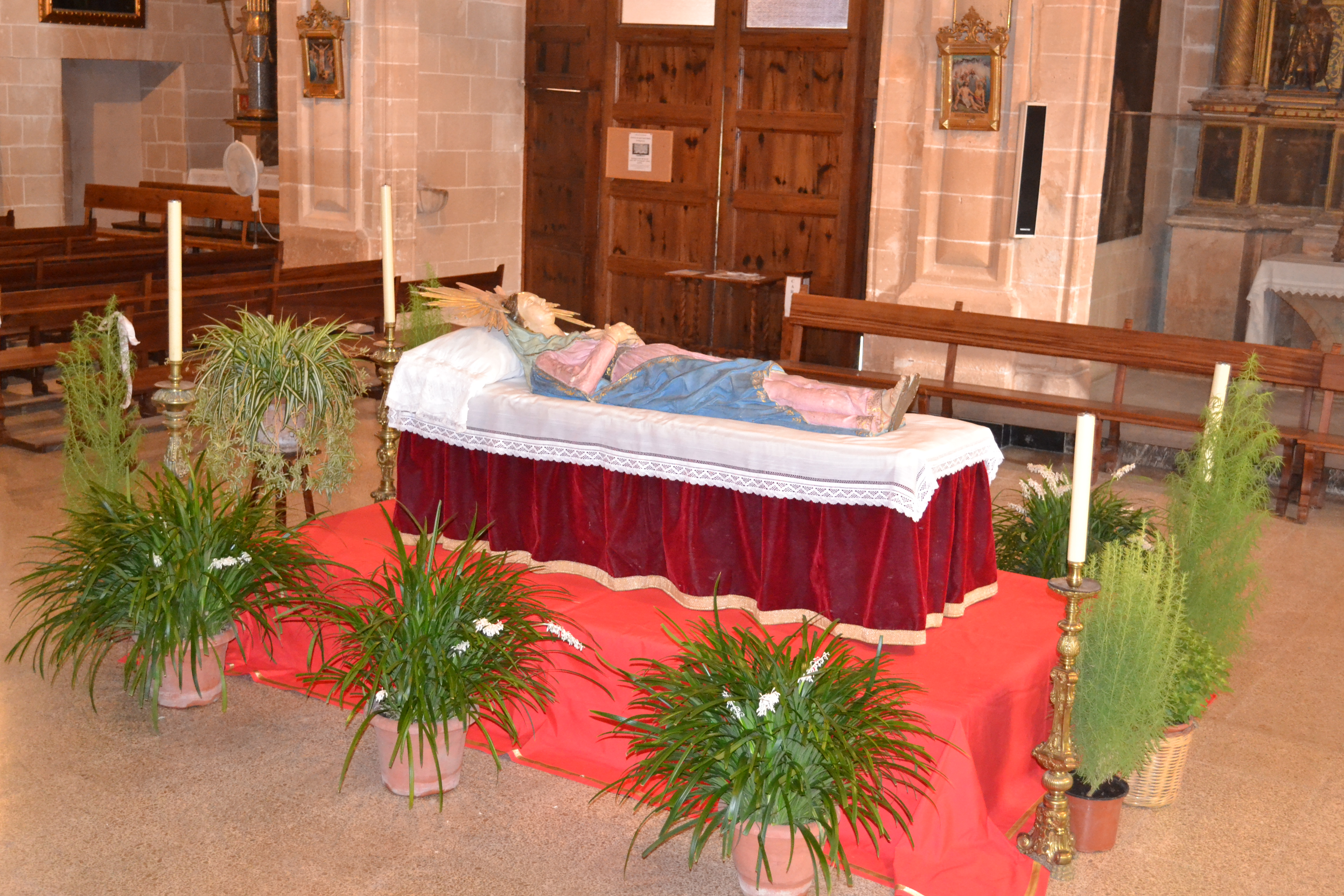 El Llit de la Mare de Déu d'Agost el dia de la Festa de l'Assumpció a l'església de Sant Bartomeu de Montuïri (Mallorca, Illes Balears)